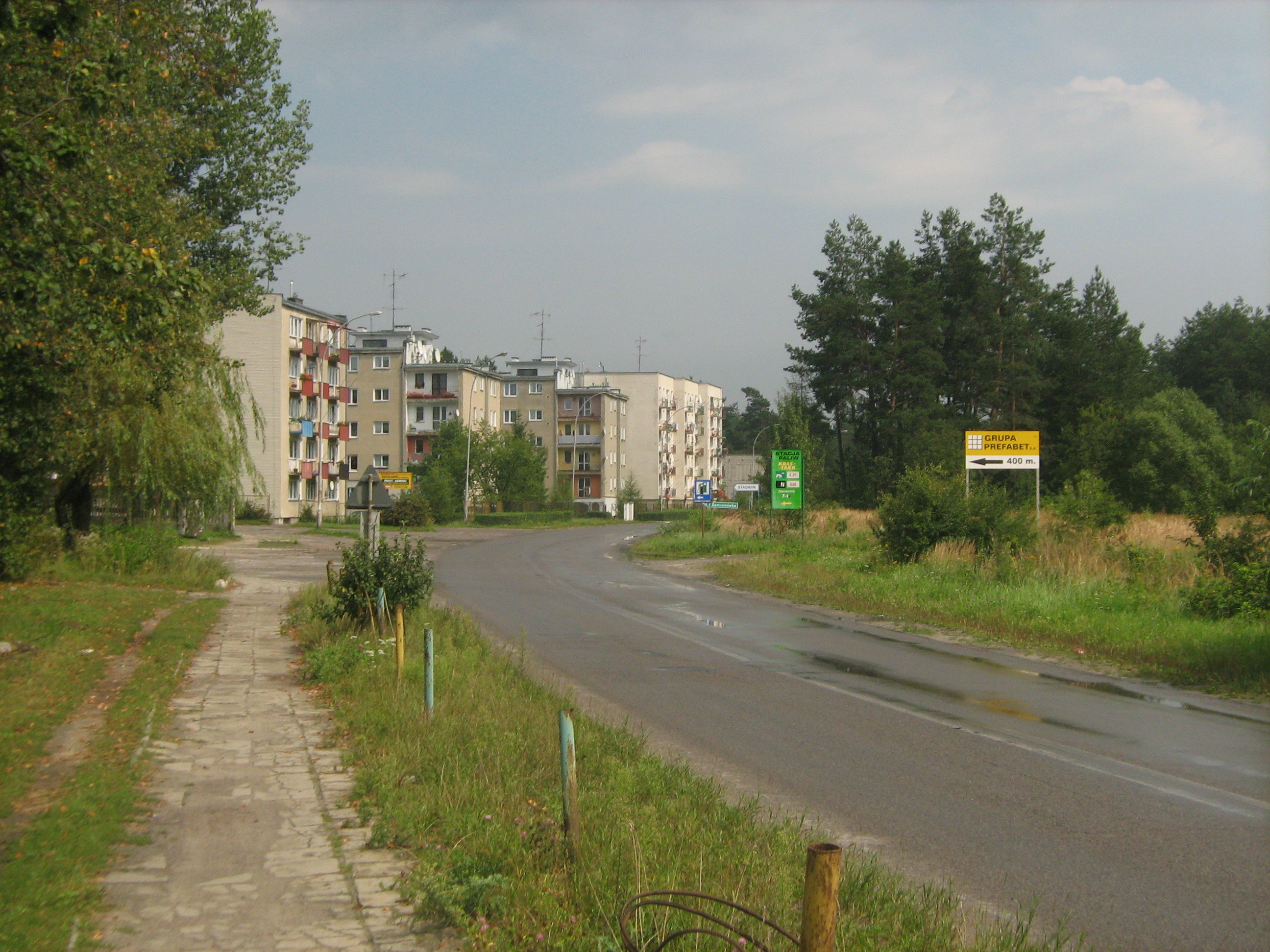 Bloki mieszkalne w Długim Kącie (powiat biłgorajski)